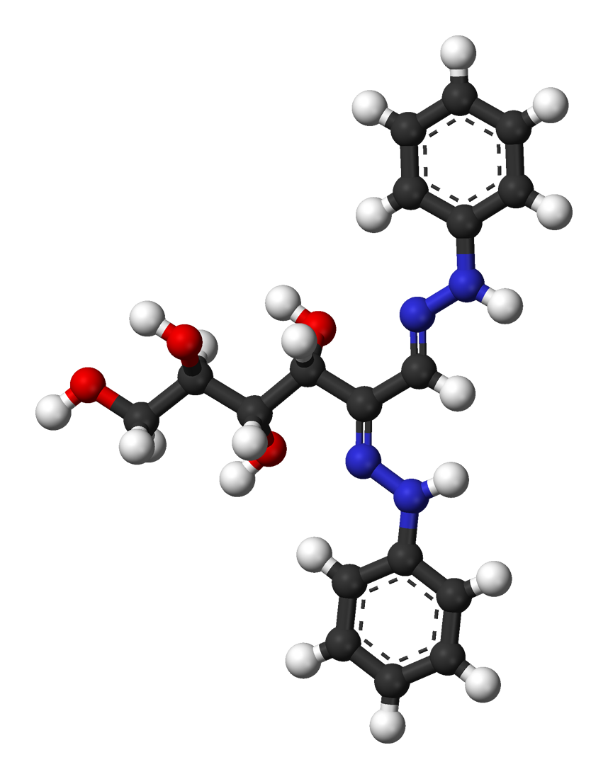 D-glucose osazone 3D balls